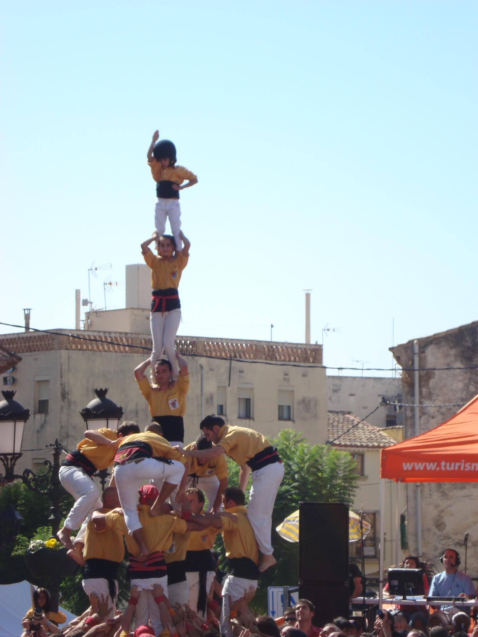 4d7a dels Castellers de Badalona al Concur7 2011